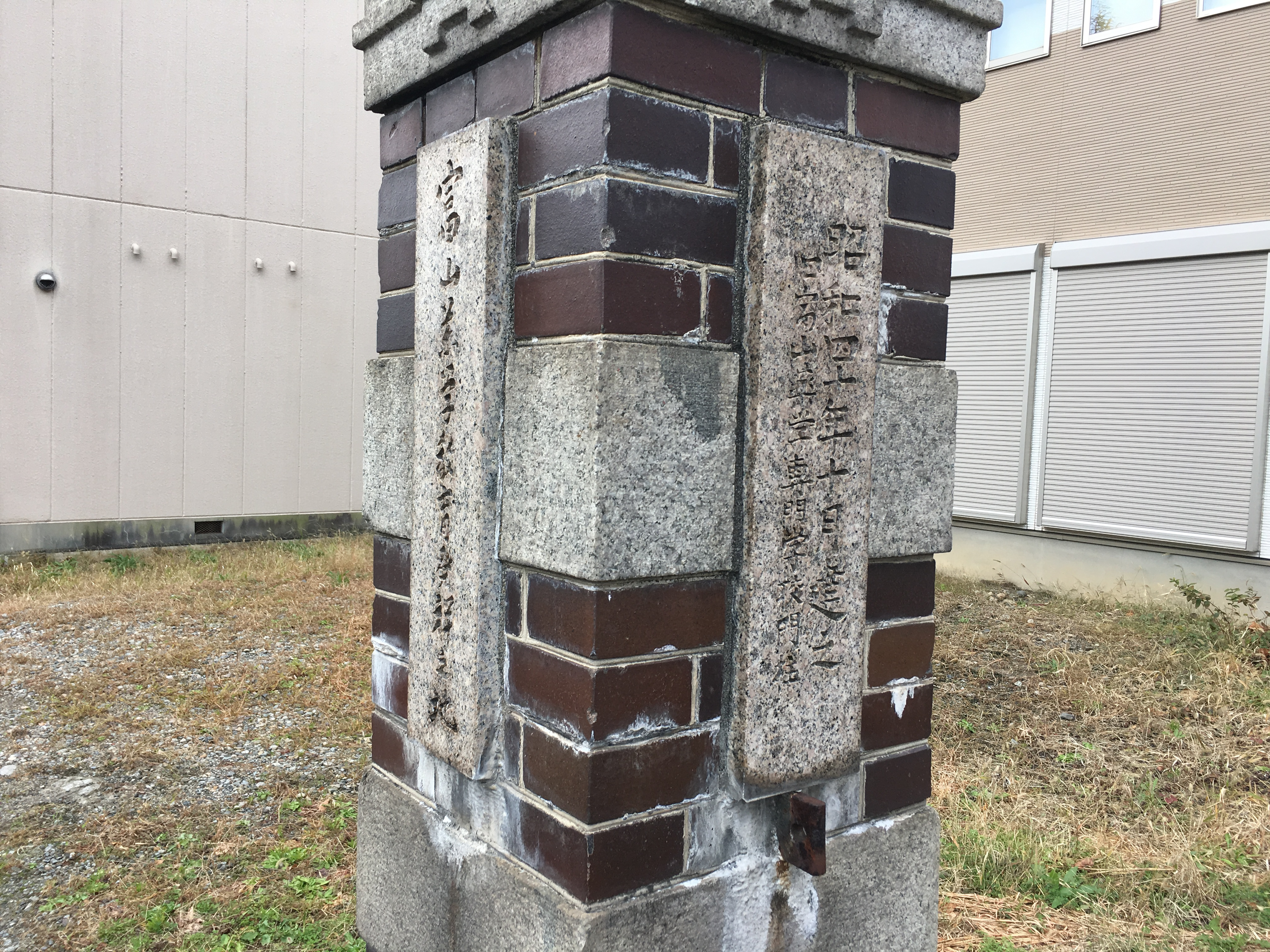 昭和40年10月建立旧富山薬学専門学校門柱の跡。右の道路側には富山薬学教育発祥の地とある。またその右面には明治26年8月、共立富山薬学校設立とある。現・廣貫堂本社が道路を挟んで南側に立っている。